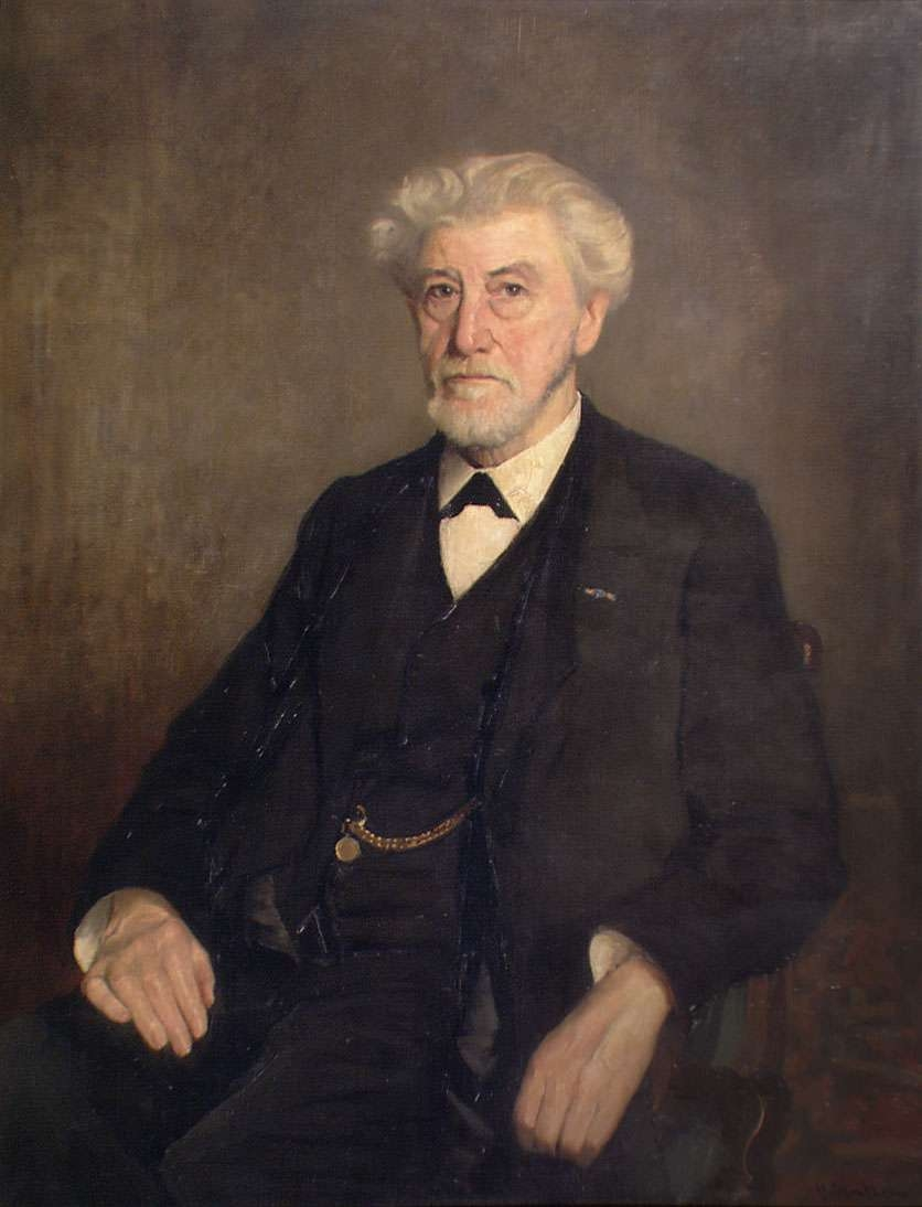 Portret van Ary Smit